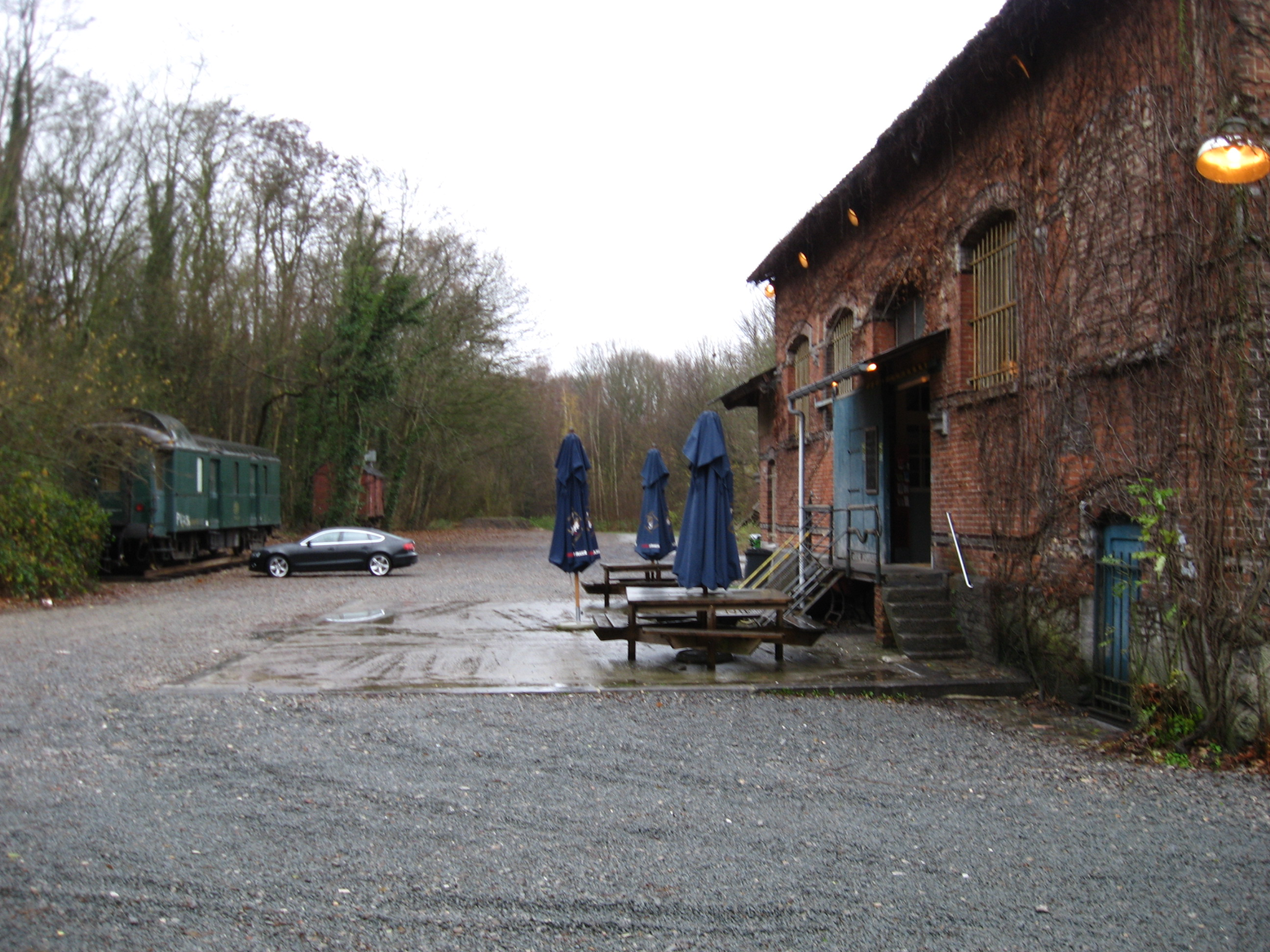 Vroegere goederenloods bij het vroegere eindpunt van spoorlijn 160 in Tervuren. Nu omgebouwd in een kroeg/restaurant